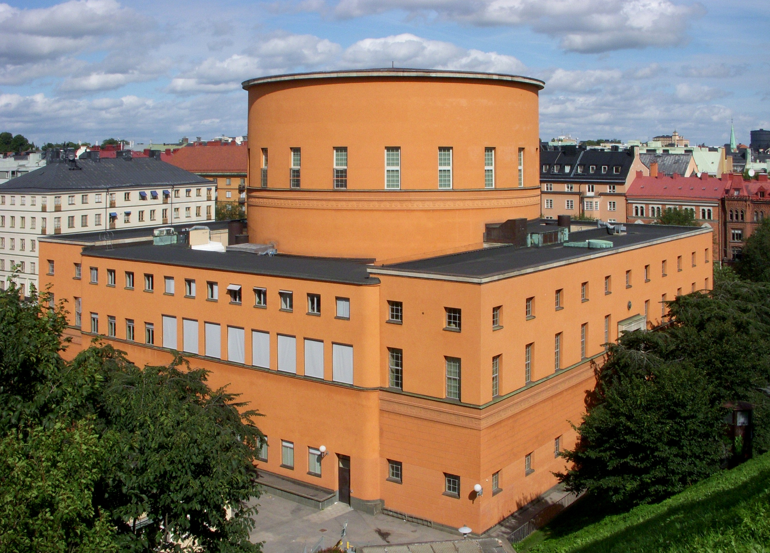 Stockholms stadsbibliotek sett från Observatoriekullen